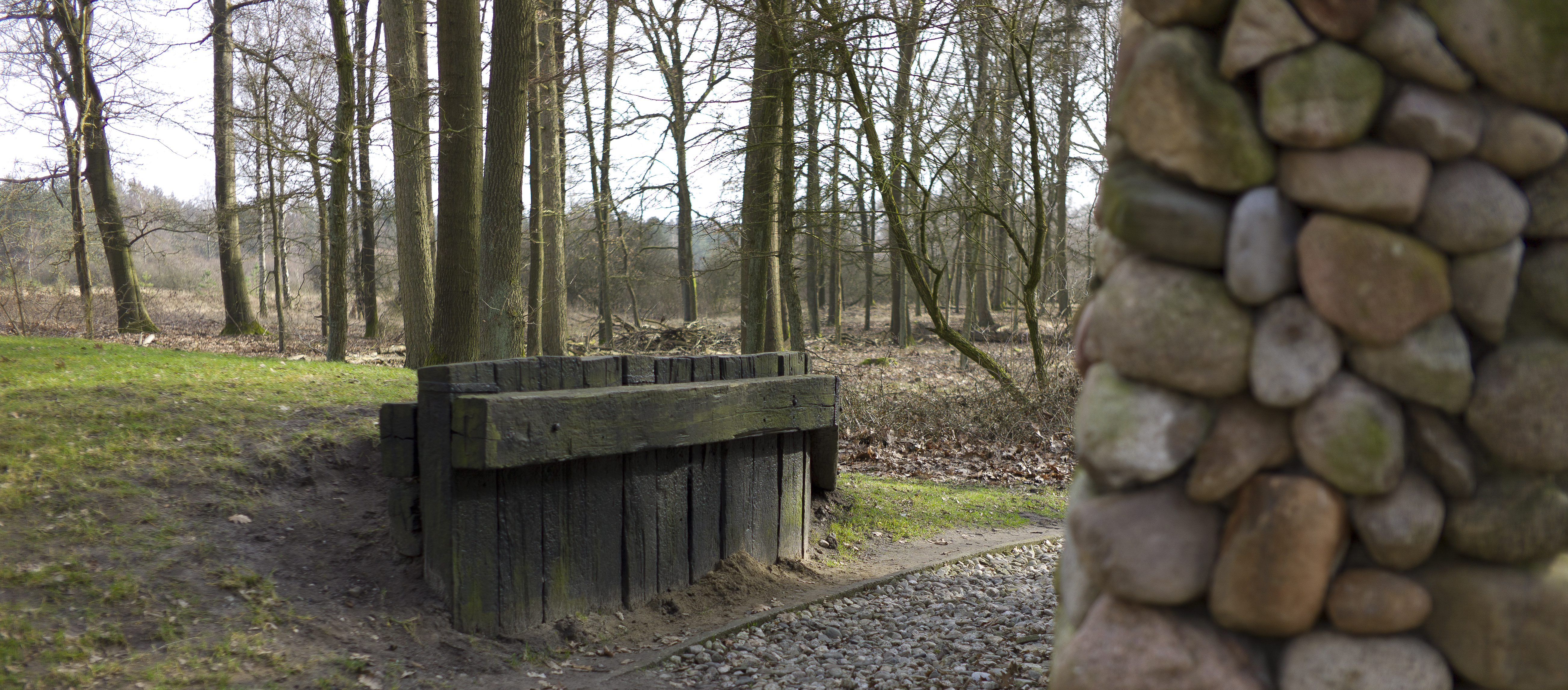 Stootblok voor het tegenhouden van treinen aan het eind van spoorrails, gelegen achter het monument van Ralph Prins. Dit object is het originele stootblok dat aan het eind van de spoorlijn naar kamp Westerbork lag.